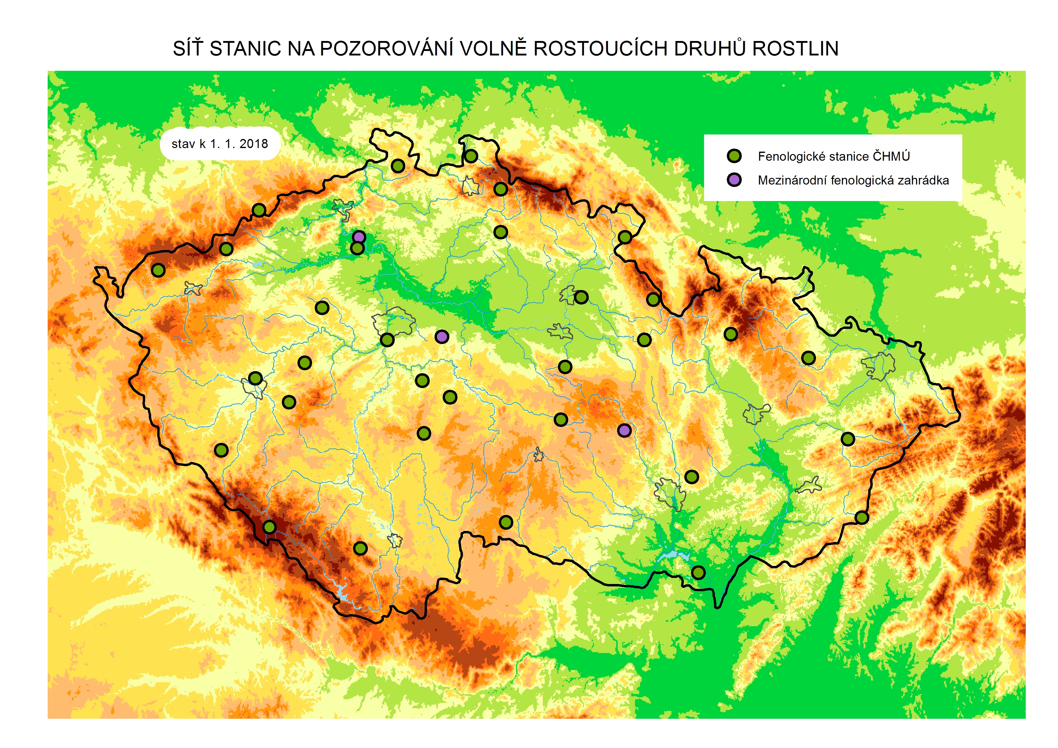 Mapa vytvořená v modifikované aplikaci ClidataGIS